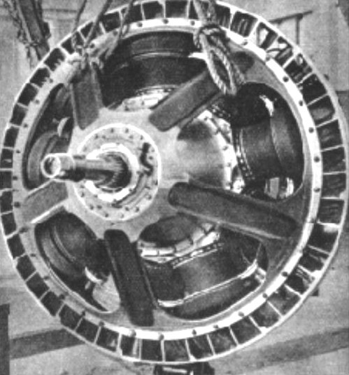 Sklenár János magyar gépészmérnök, feltaláló csillagmotorja.